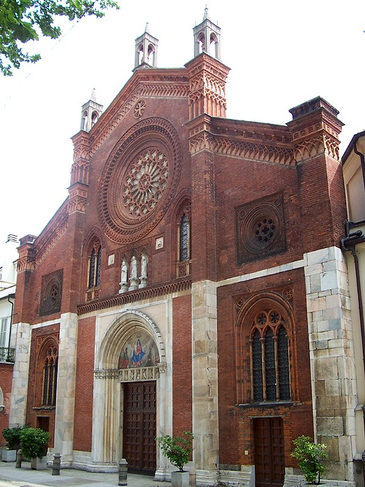 Milano - Chiesa di S. Marco